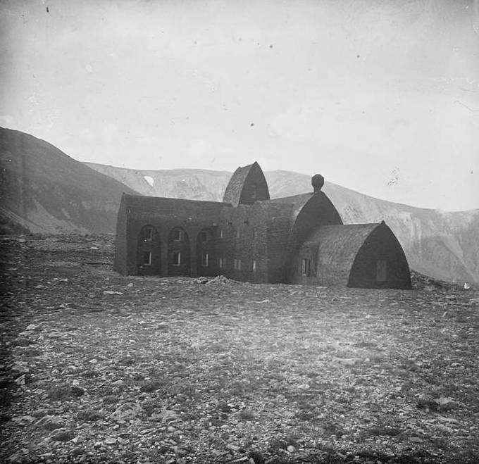 Vista d ' un xalet d ' Ulldeter. Josep Salvany i Blanch (1918)